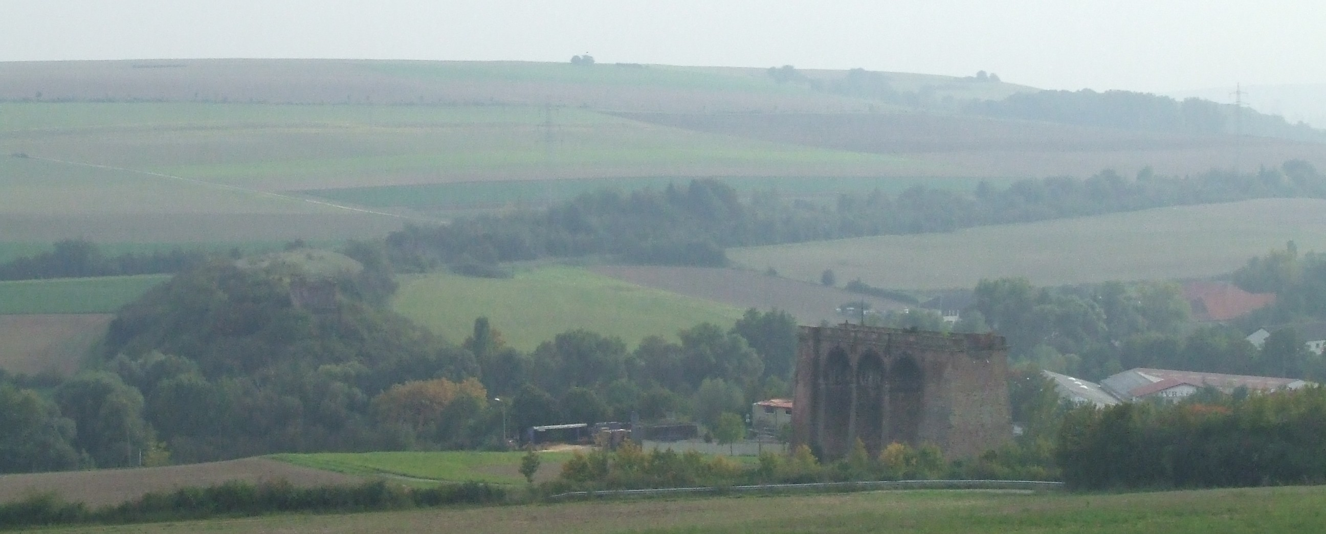 Pfrimmtalviadukt bei Marnheim